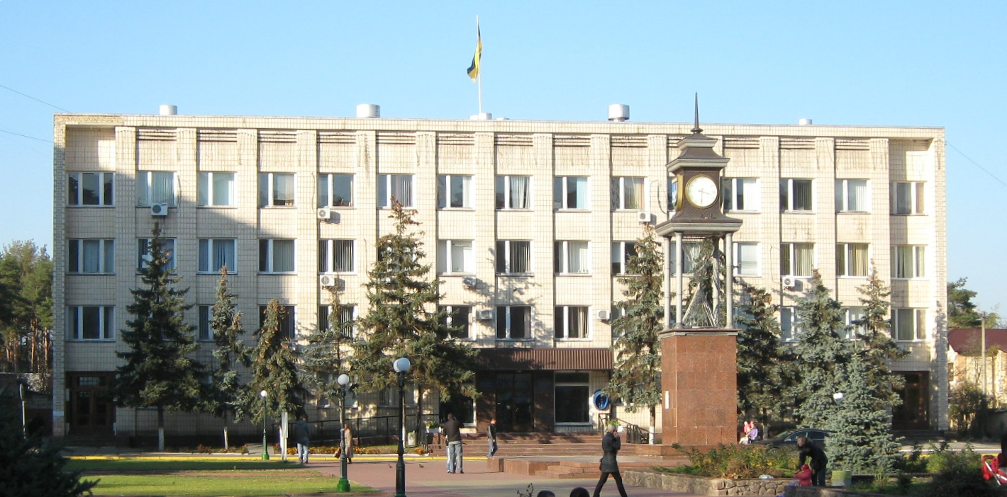 Ірпінська міськрада